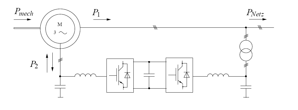 Doppelt gespeiste Asynchronmaschine System